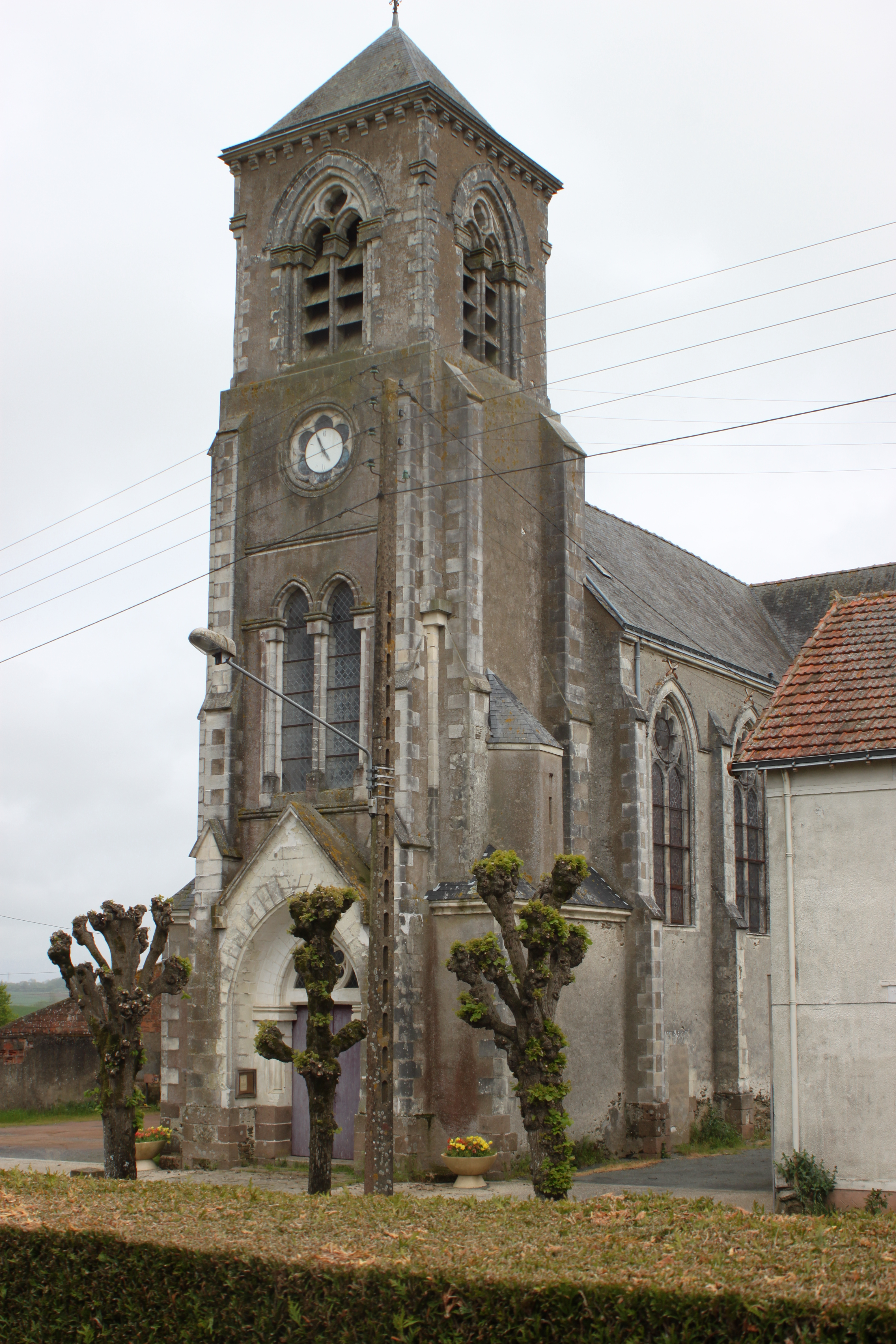 Église Saint-Christophe, 1872, la Blouère, Fr-49-Villedieu-la-Blouère.